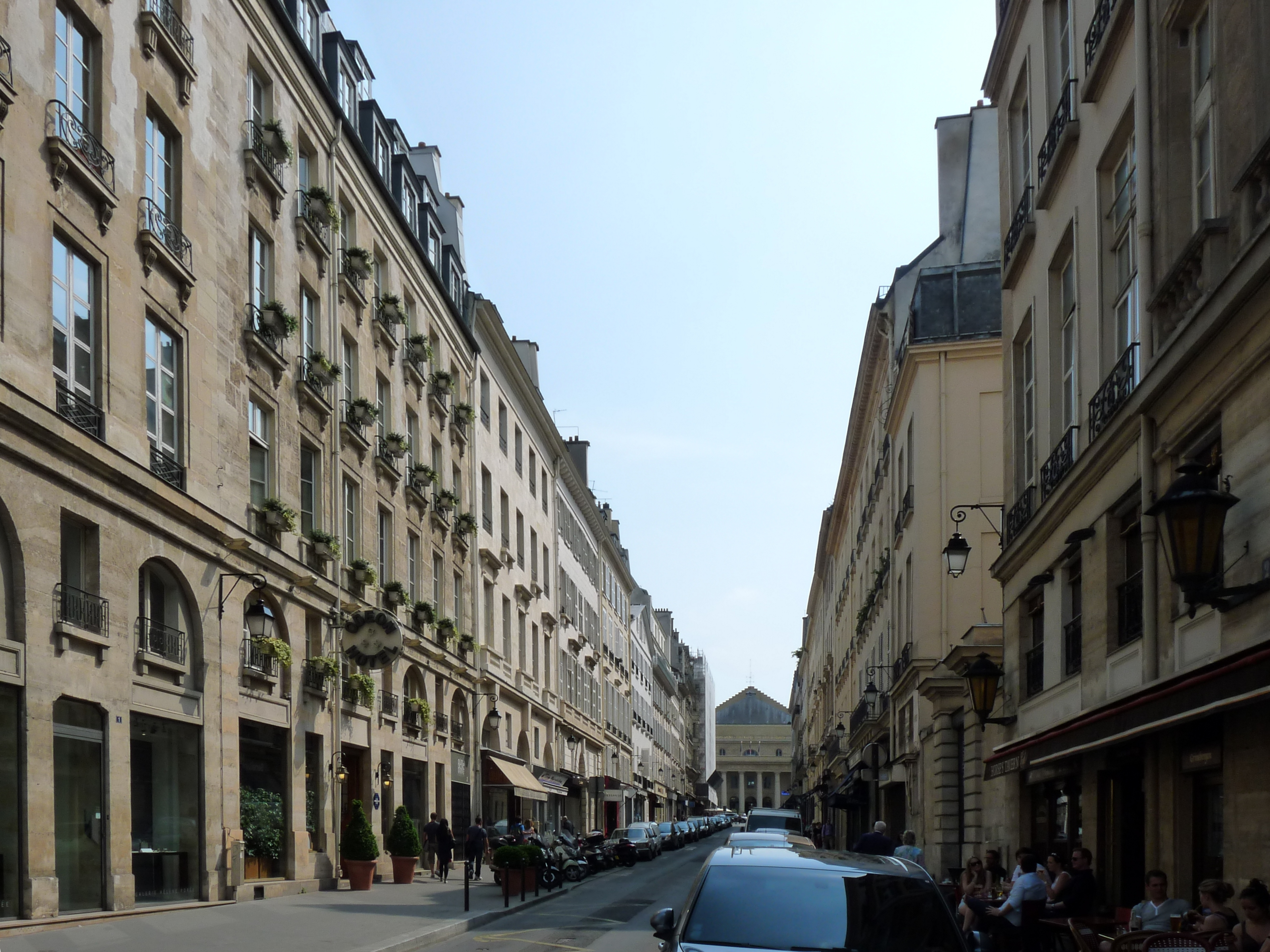 La rue de l'Odéon à Paris, vue vers le sud depuis le carrefour de l'Odéon. Au fond le théatre de l'Odéon.